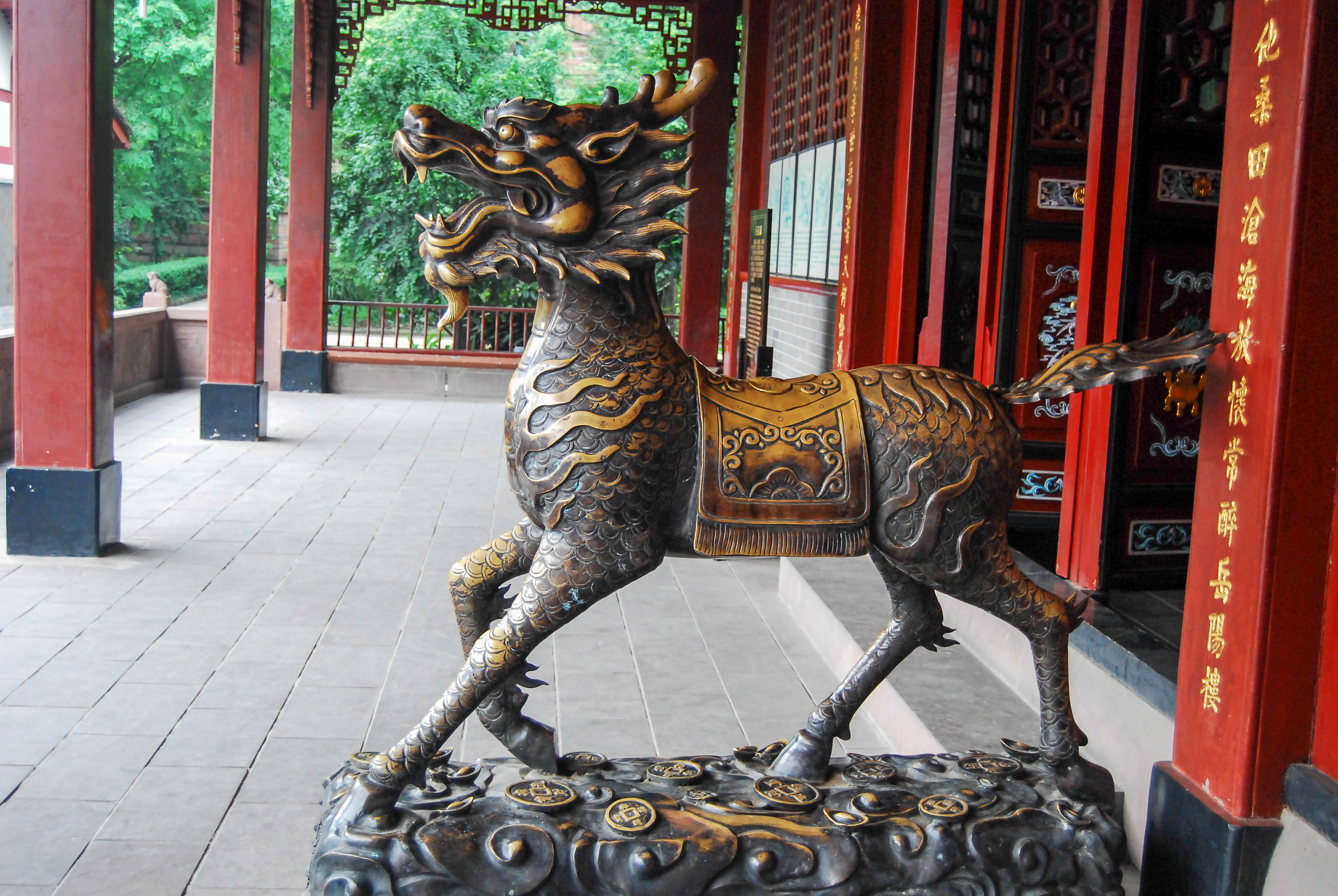 中文（中国大陆）: 青羊宫麒麟